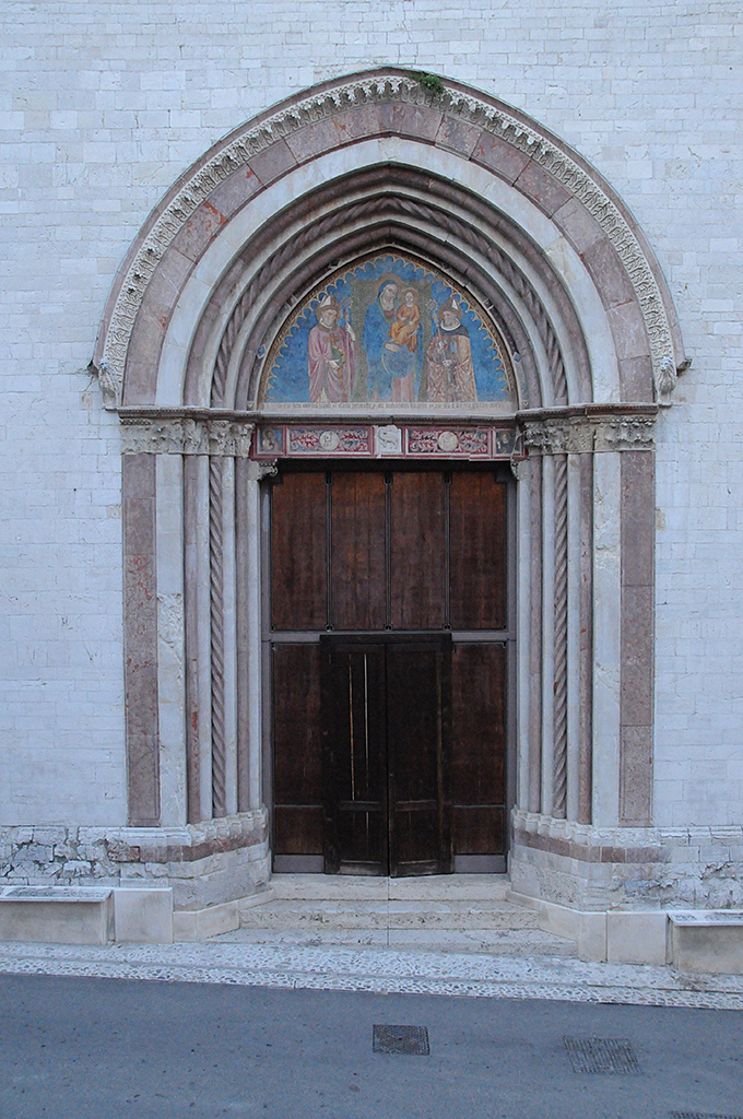 Spoleto - Chiostro di San Nicolò